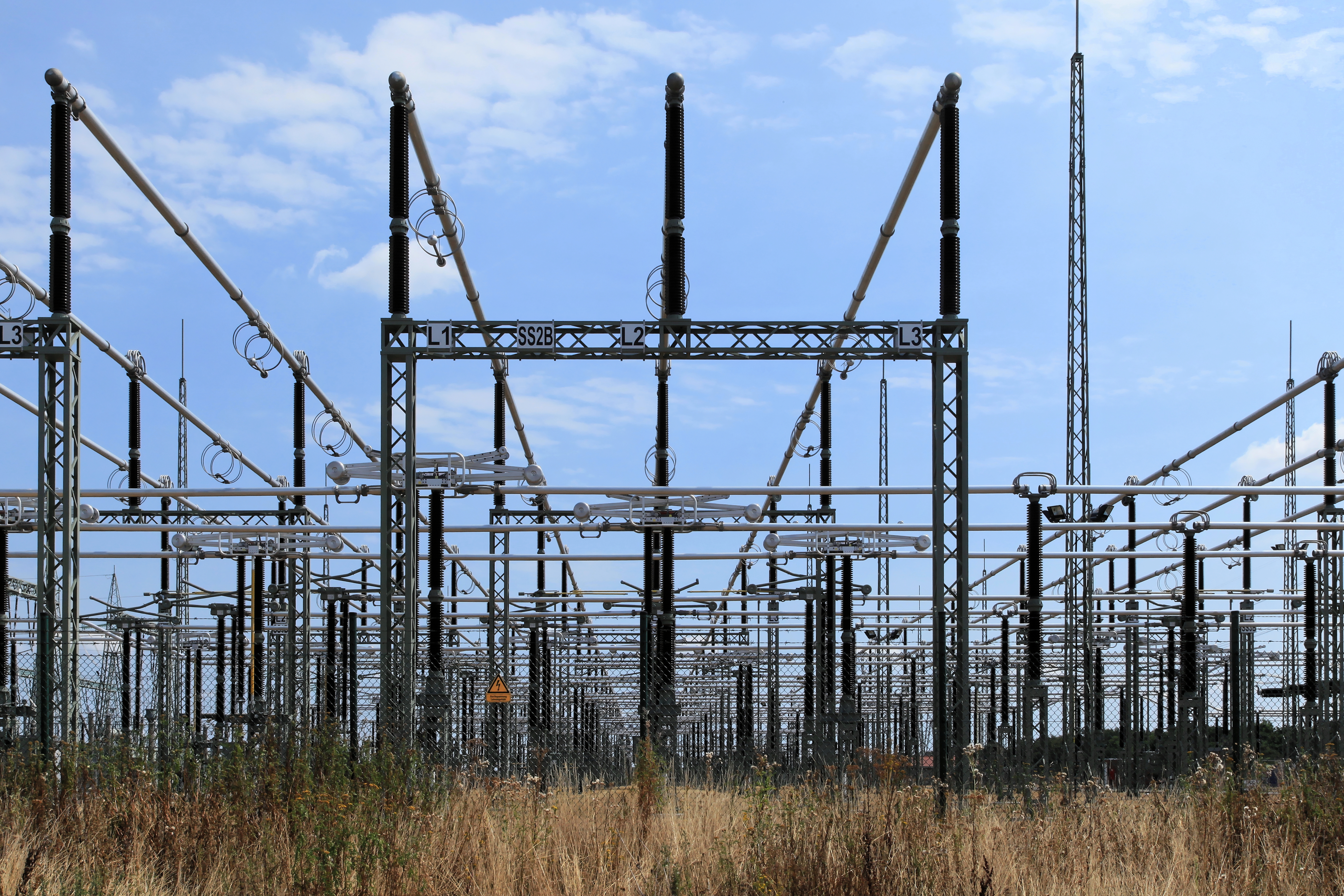 Umspannwerk Dörpen-West, Deichstraße in Heede (Emsland)